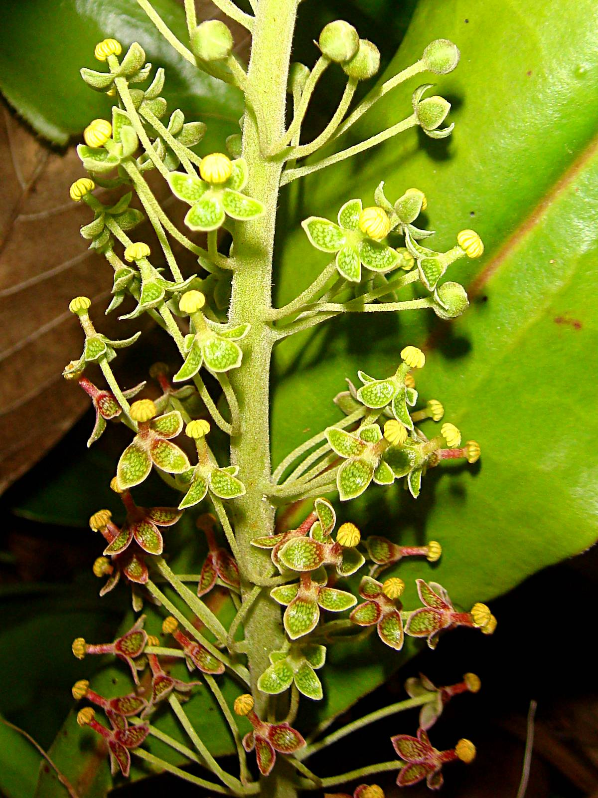 Bunga Jantan Nepenthes maxima